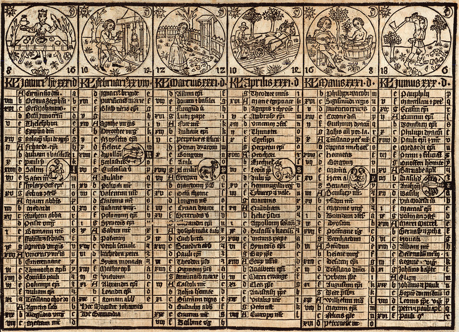 Kalender nach Johannes von Gmunden, 1 Bl. doppelseitig bedruckt mit 2 Holzschnitten. Blockgröße: 27,6 x 38,7 cm. Blattgröße: 41,3 x 30,2 cm. Abzug wohl des 18. Jahrhunderts von einem Holzstock um 1470.